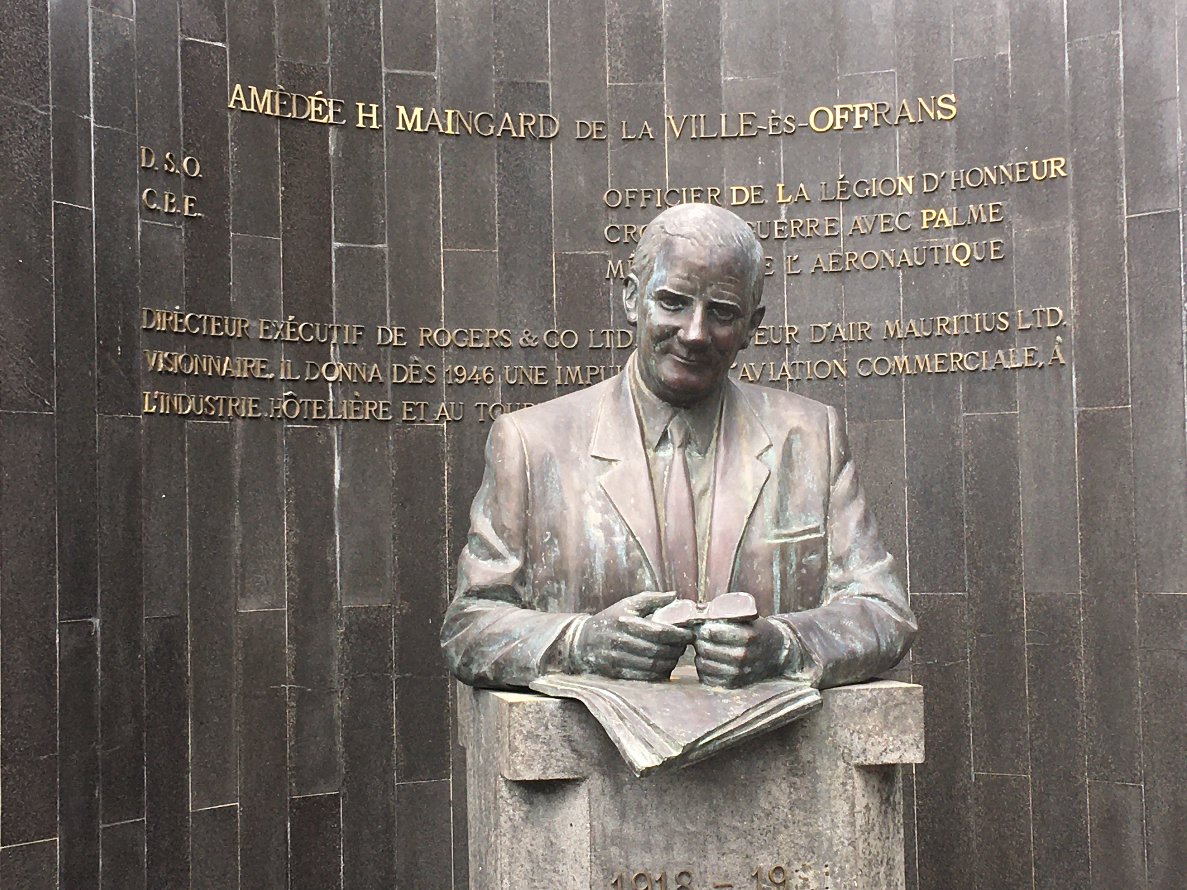 Ce monument représente Amédée Maingard et donne quelques éléments sur le rôle qu'il a joué à Maurice, notamment par la création de la compagnie aérienne Air Mauritius.